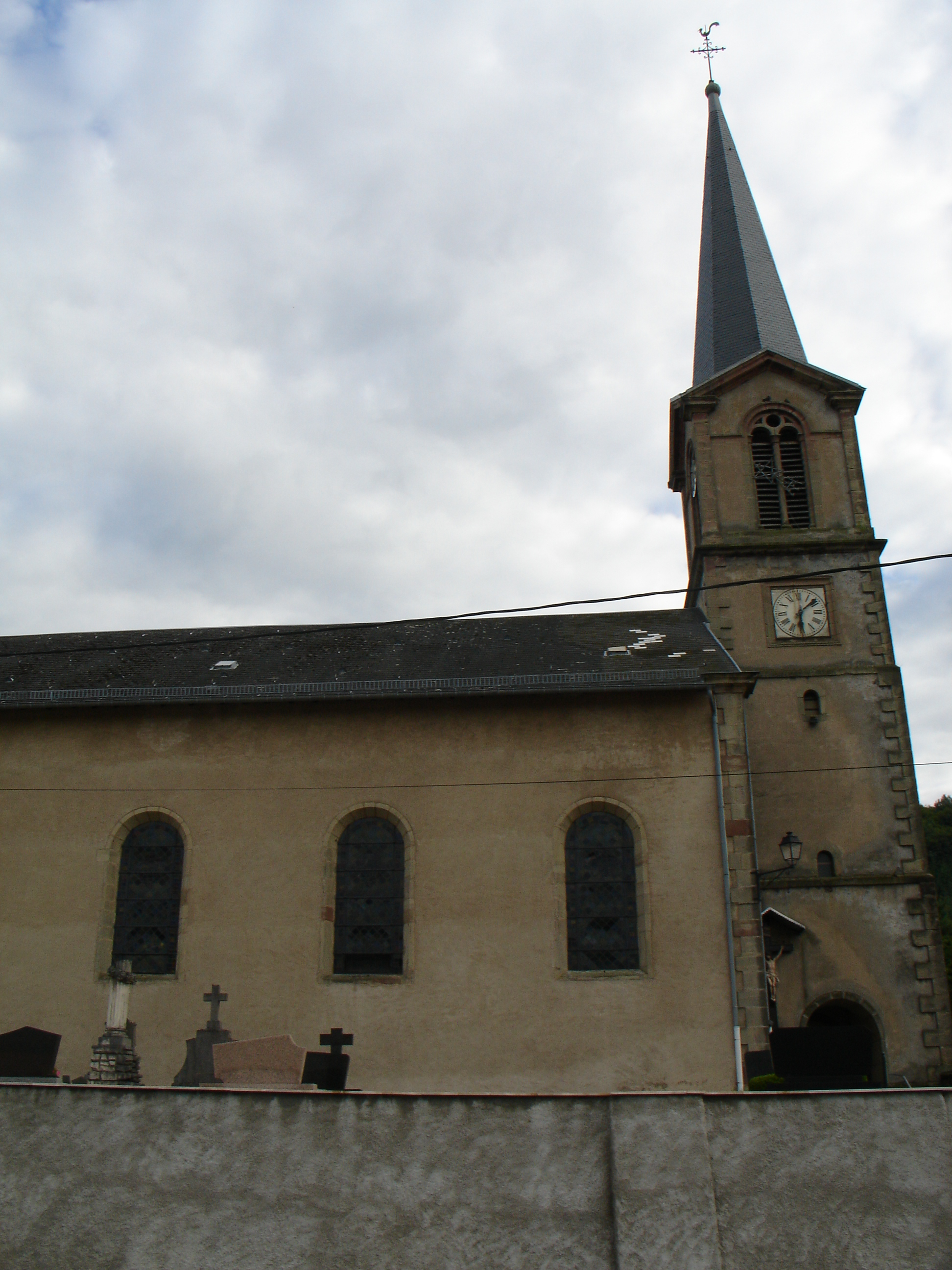 L'Église Saint-Michel de Hargarten-aux-Mines.